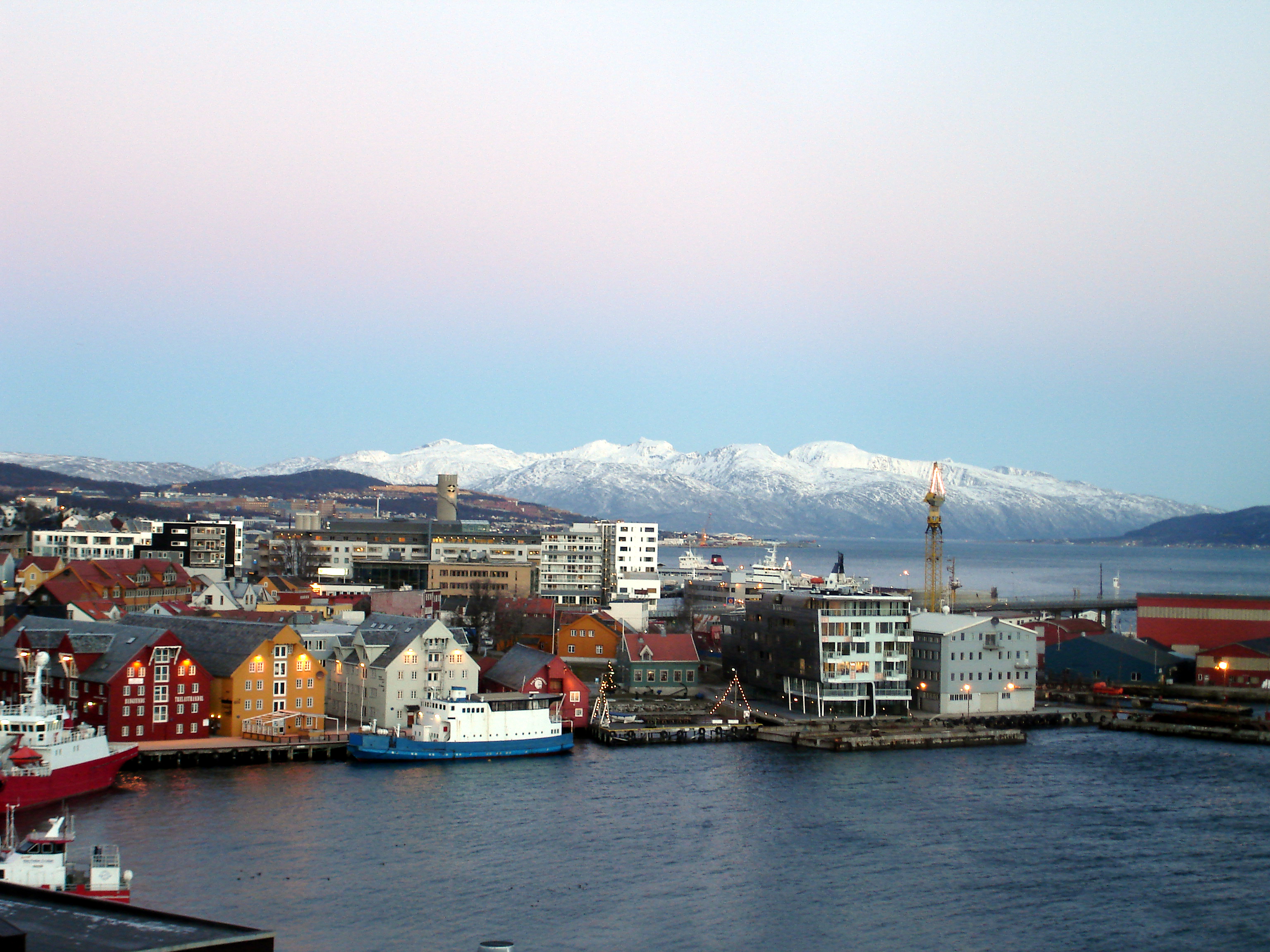 Tromsø harbour